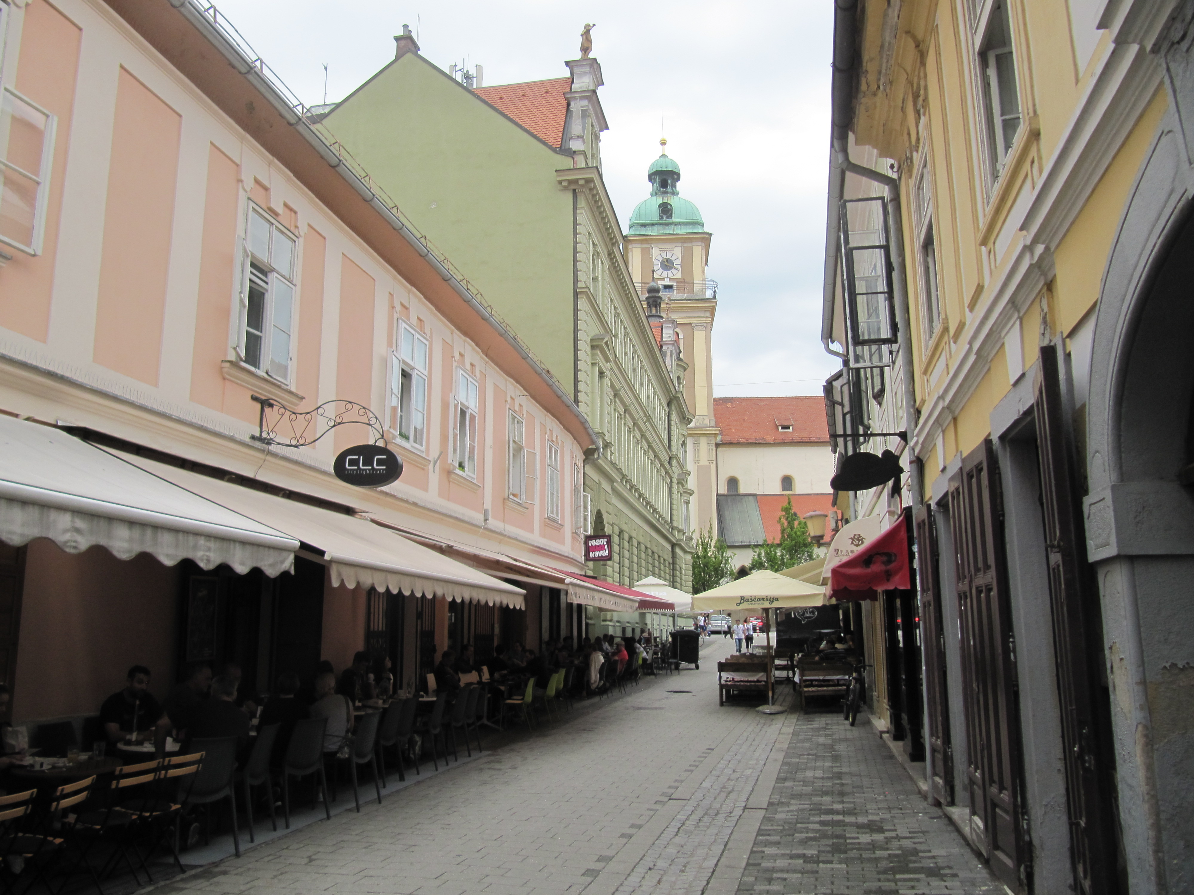 Poštna ulica